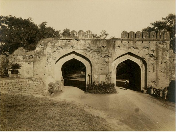 Kashmere Gate, Delhi, India c1865.